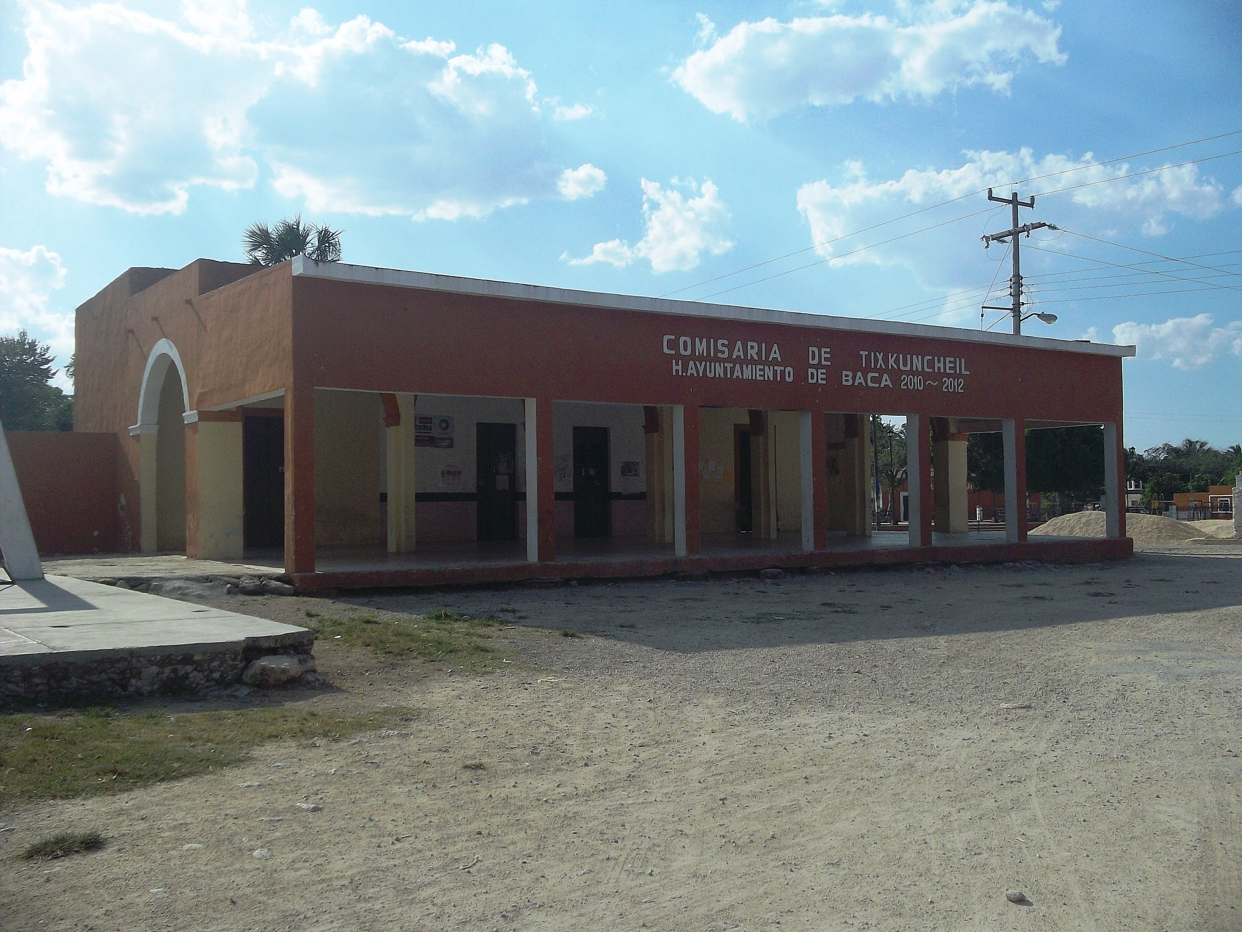 Casa comisarial de Tixkuncheil, Yucatán.